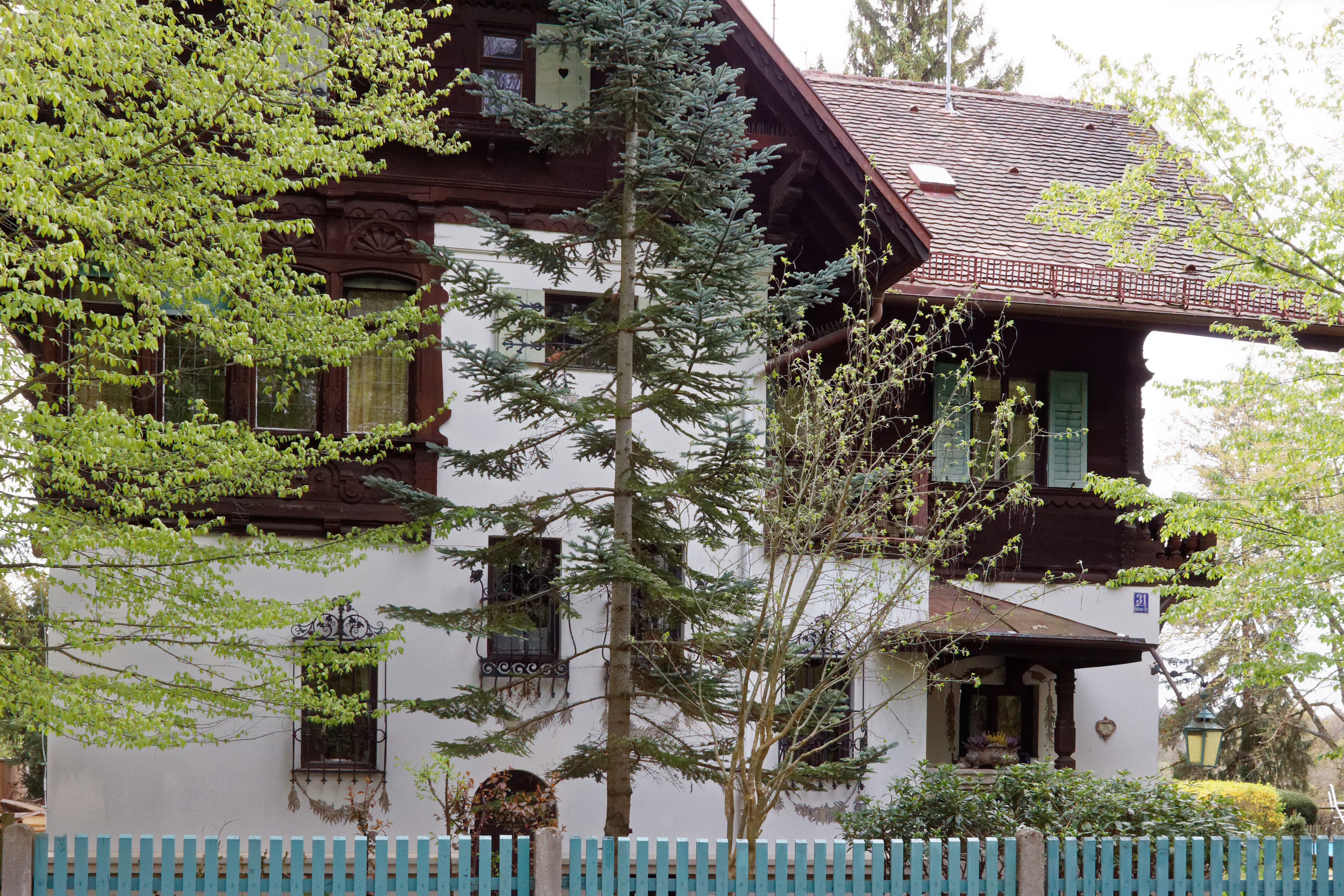 Villa Scheibe in der Heilmannstraße 33 in München